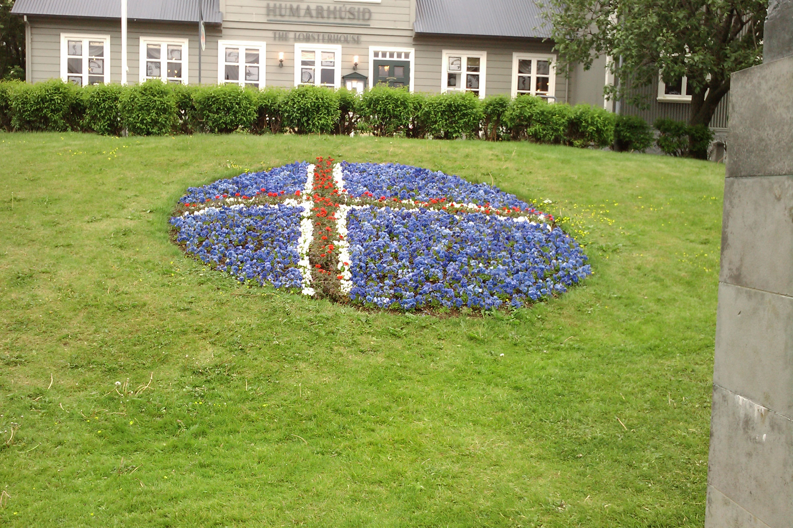 parterre de fleur représentant le drapeau islandais, Reykjavik